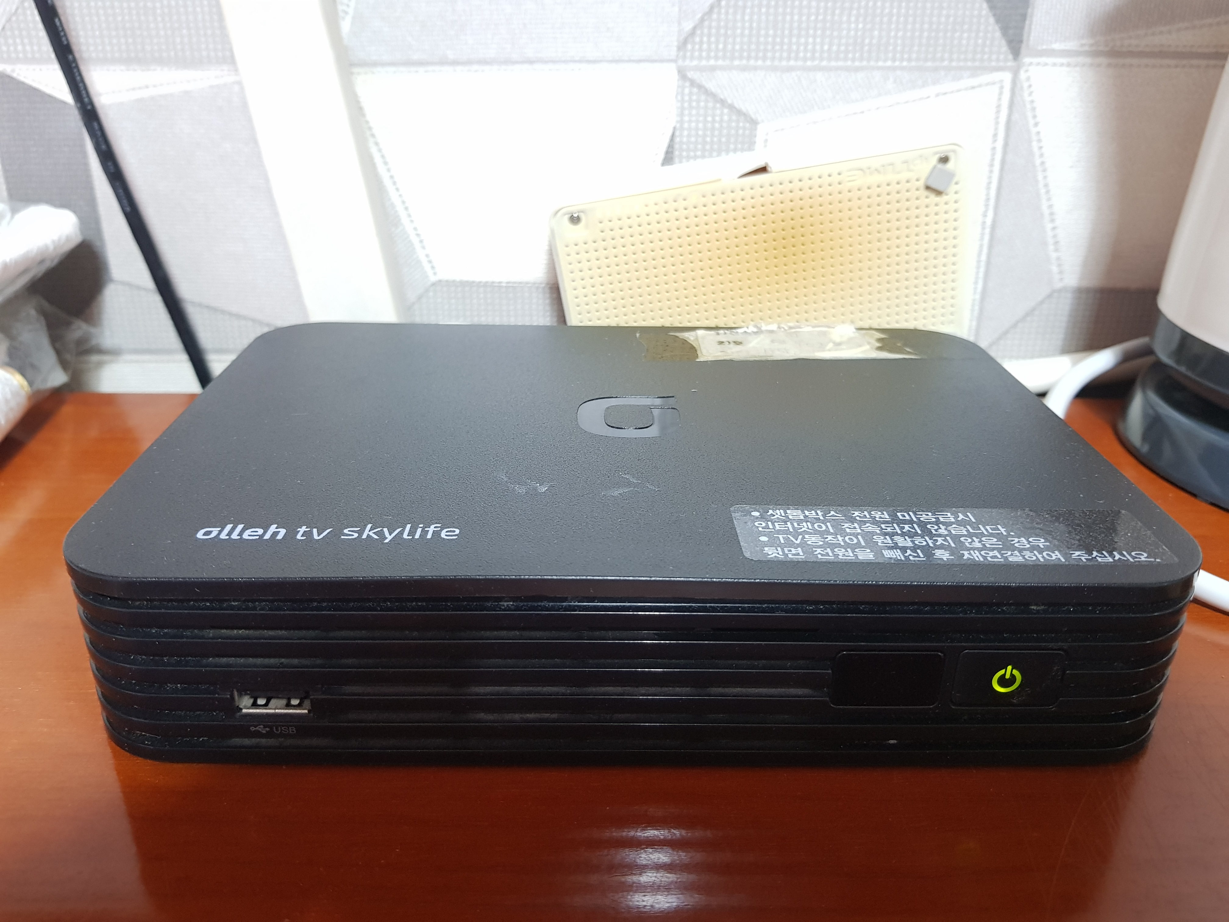 Olleh TV Skylife 셋탑박스